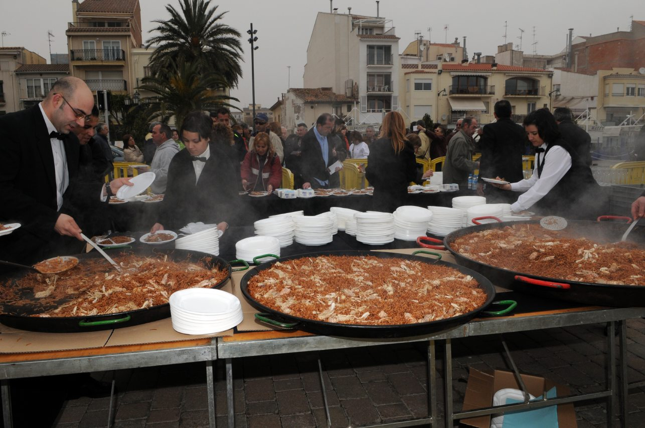 Momento de la Galerada Popular en el Puerto de Cambrils con motivo de las Jornadas de la Galera